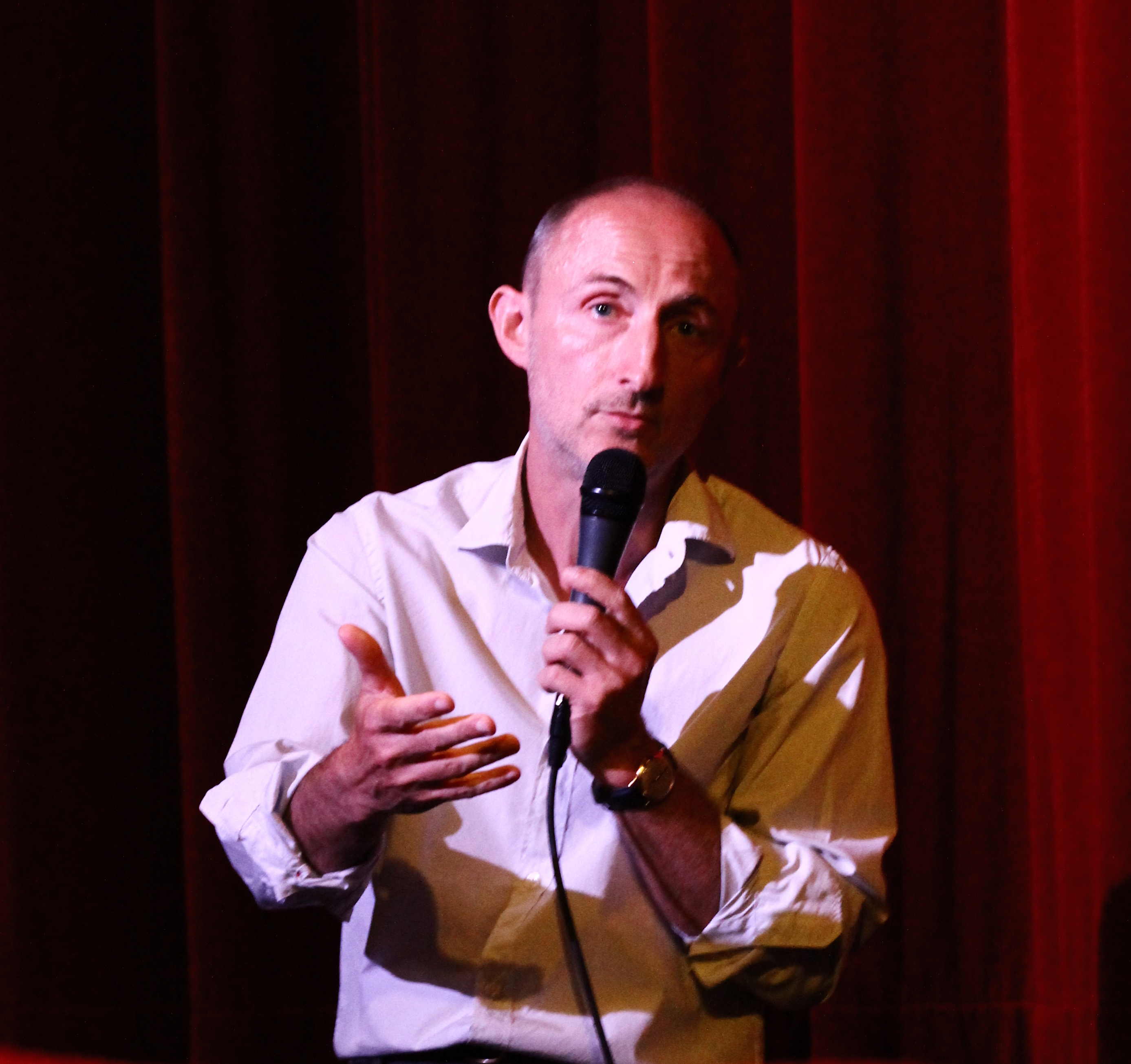 Guillaume Nicloux et Michel Houellebecq - L'enlèvement de Michel Houellebecq